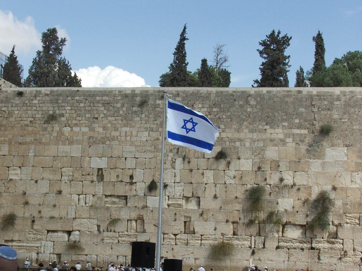 Western Wall in Jerusalem, October 2006